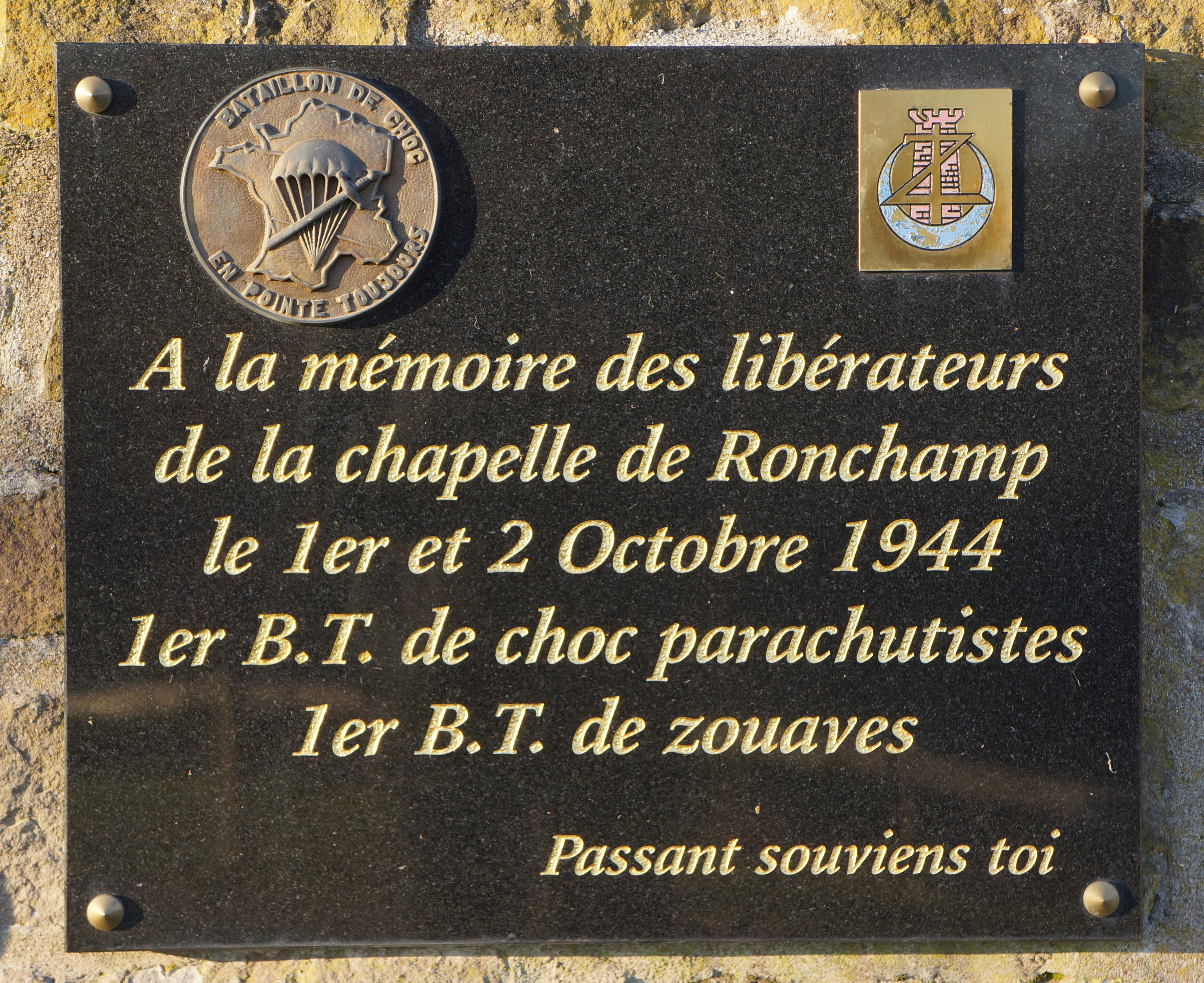 Plaque commémorative au sommet de la colline de Bourlémont (Ronchamp, Haute-Saône).